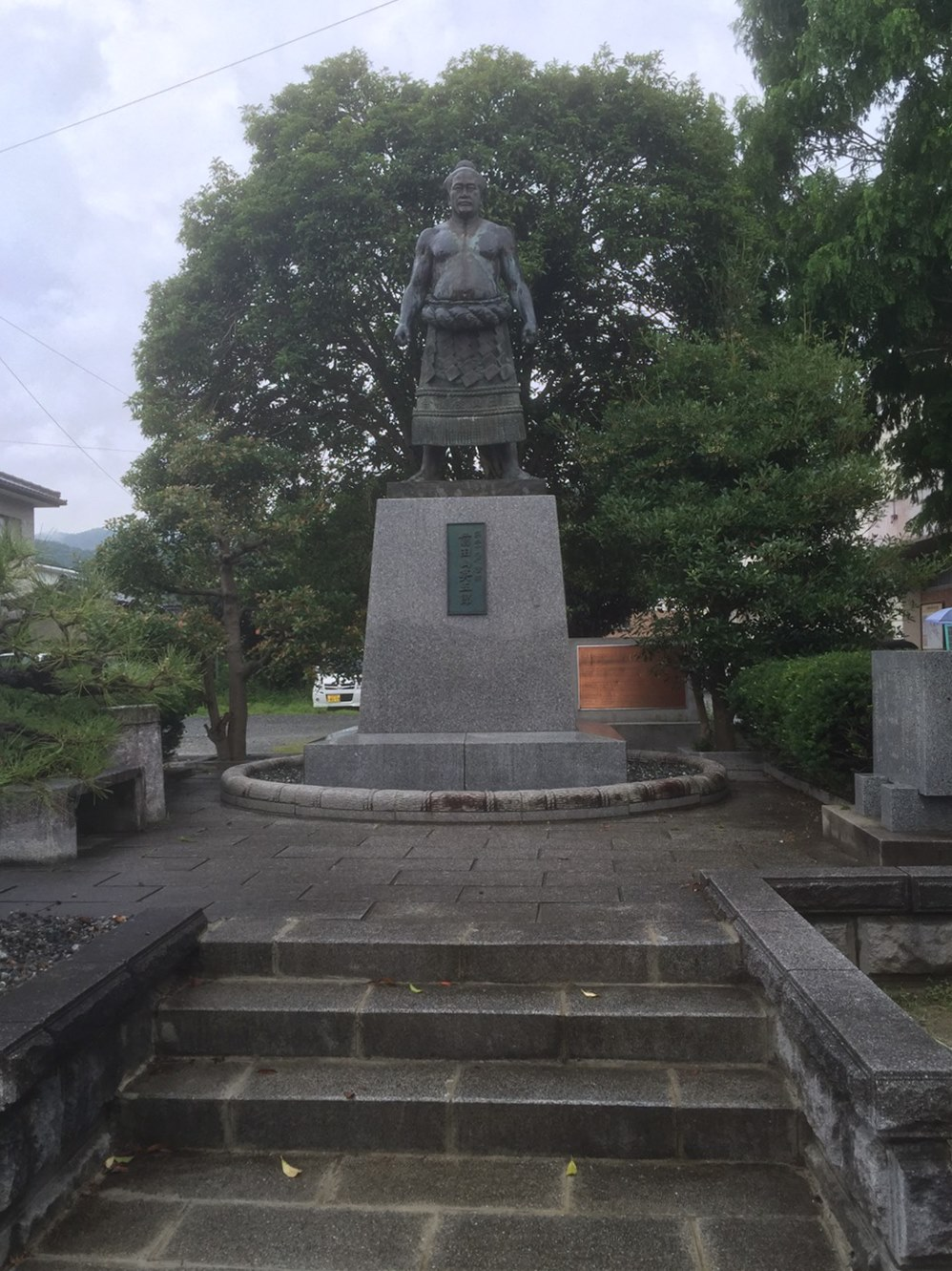 保内町出身の第３９代横綱 前田山の銅像。喜須来小学校前に立つ。小学生が定期的に清掃しており、毎年相撲大会が開催されている